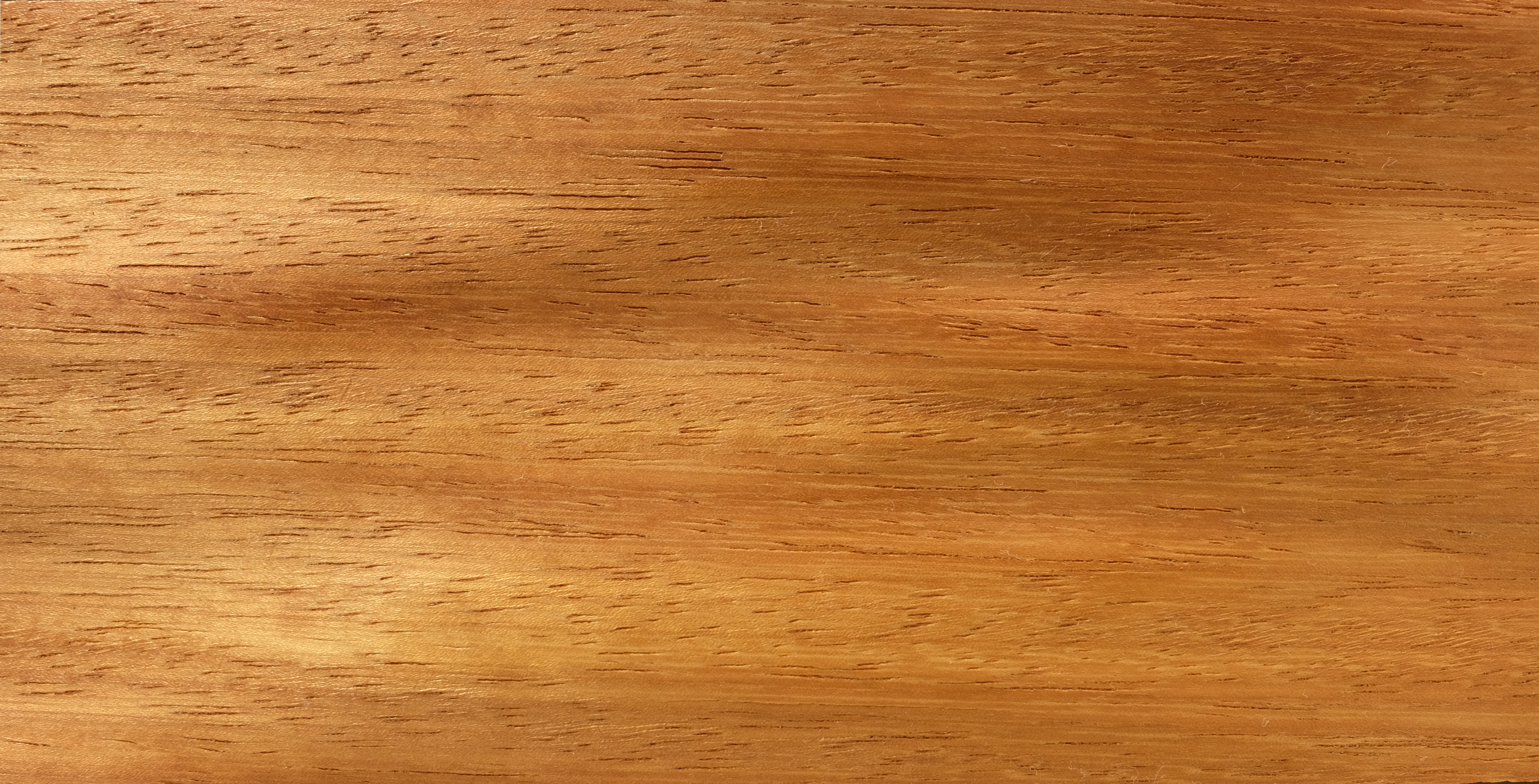 gemessertes Furnier; Holzart: IRO, Iroko, Kambala, Mvule